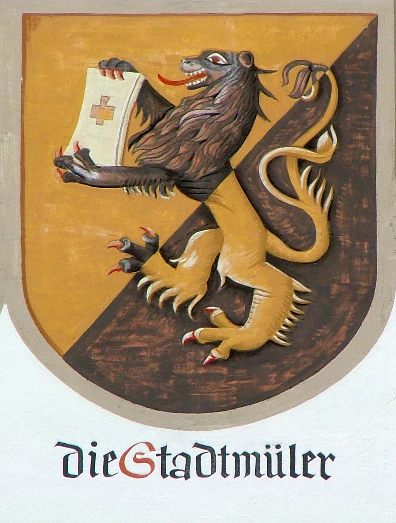 Am Rathaus